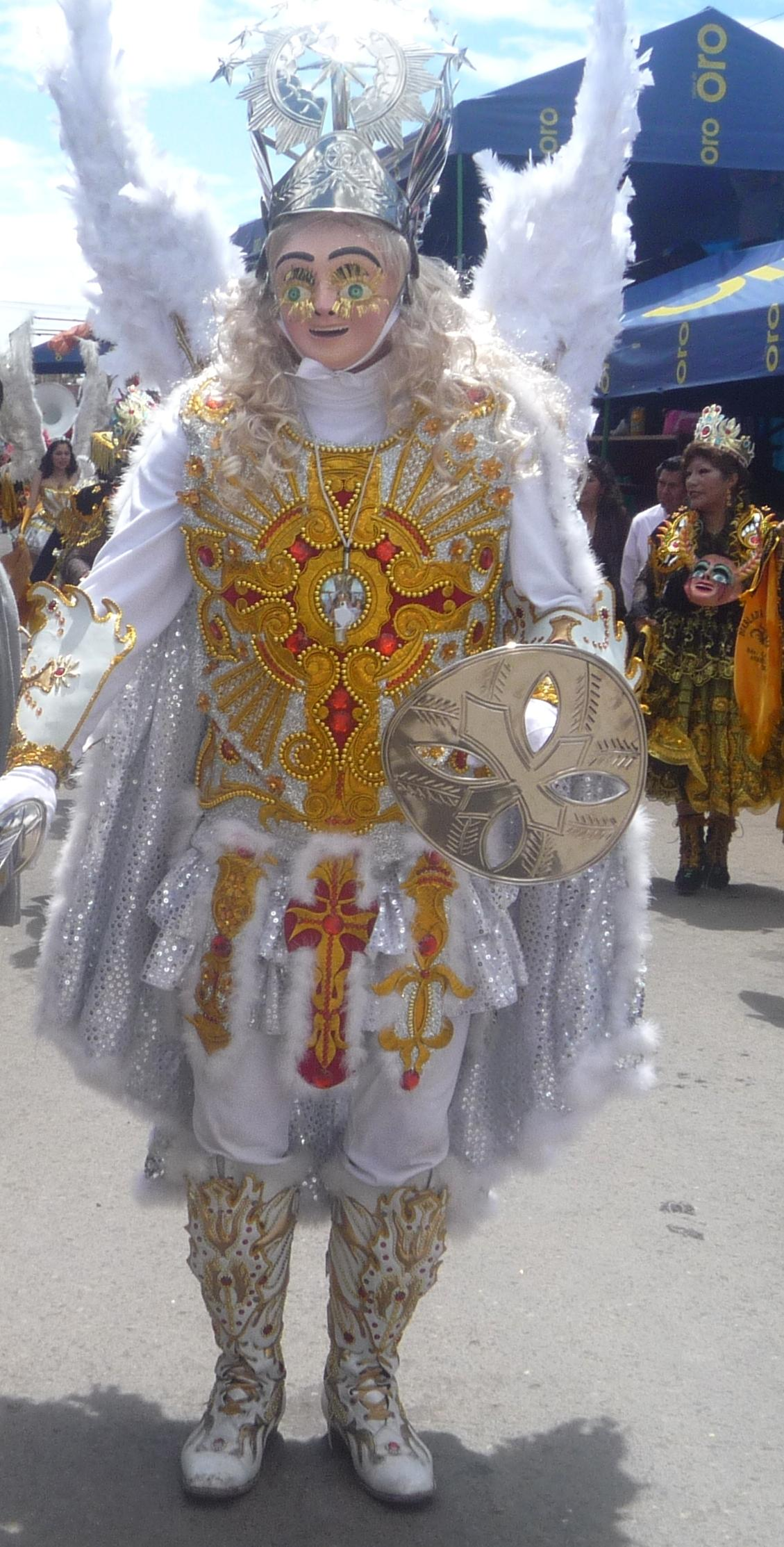 Diablada Puneña - Peru. Festividad Virgen de la Candelaria 2013